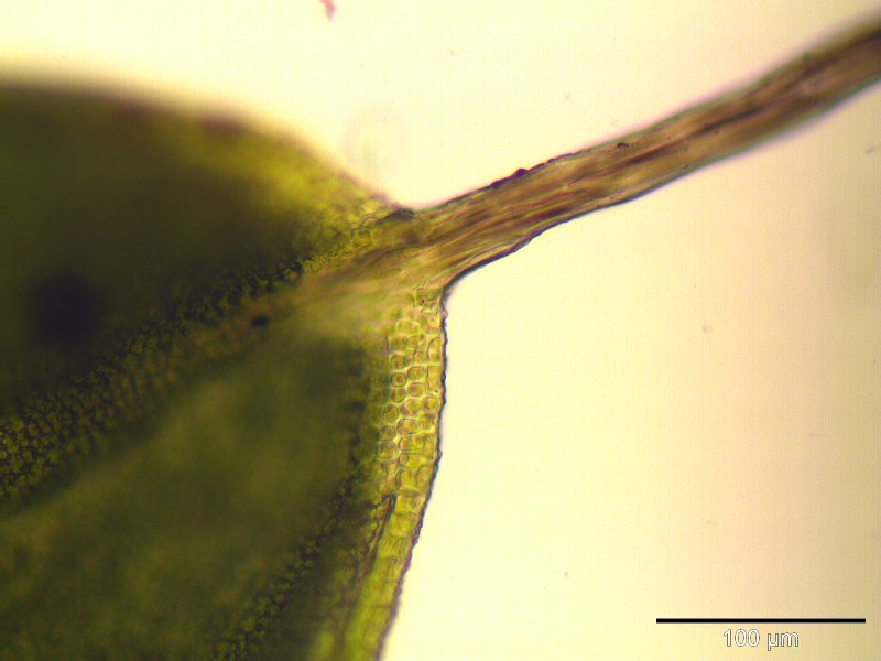 Mauer-Drehzahnmoos (Tortula muralis), gelblich gefärbter Blattsaum, Vergrößerung: 250x